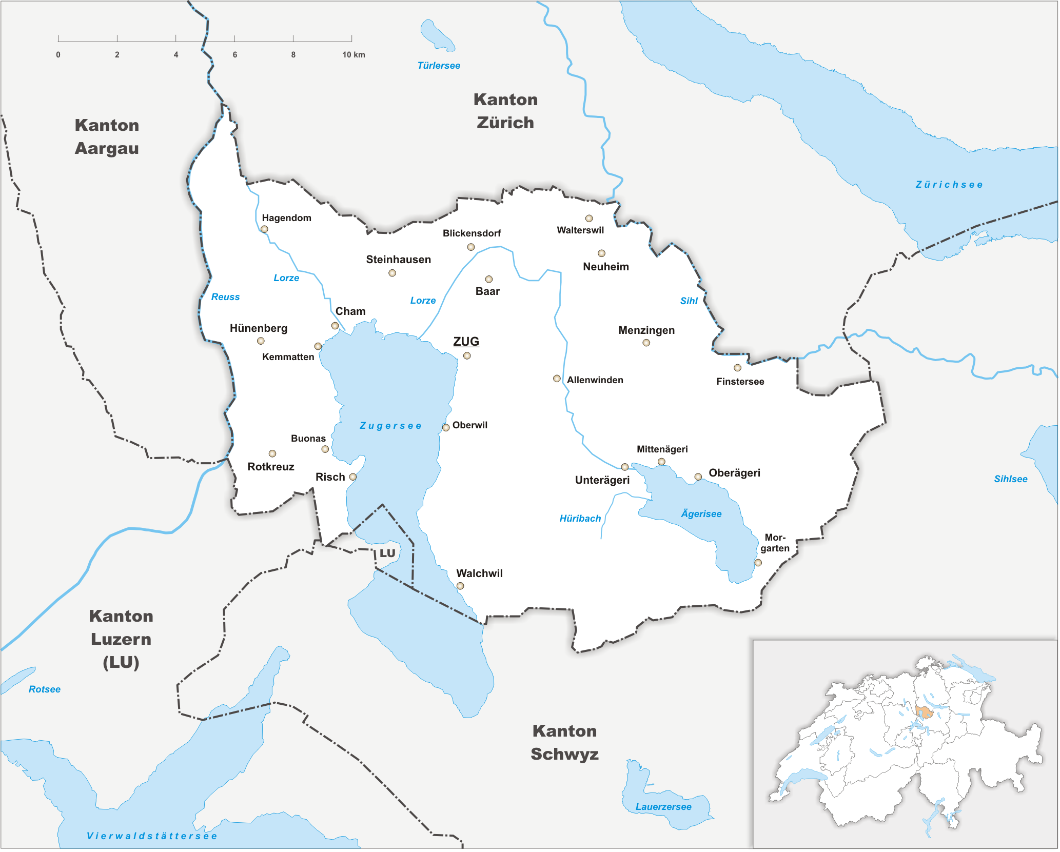 Karte des Kanton Zug.